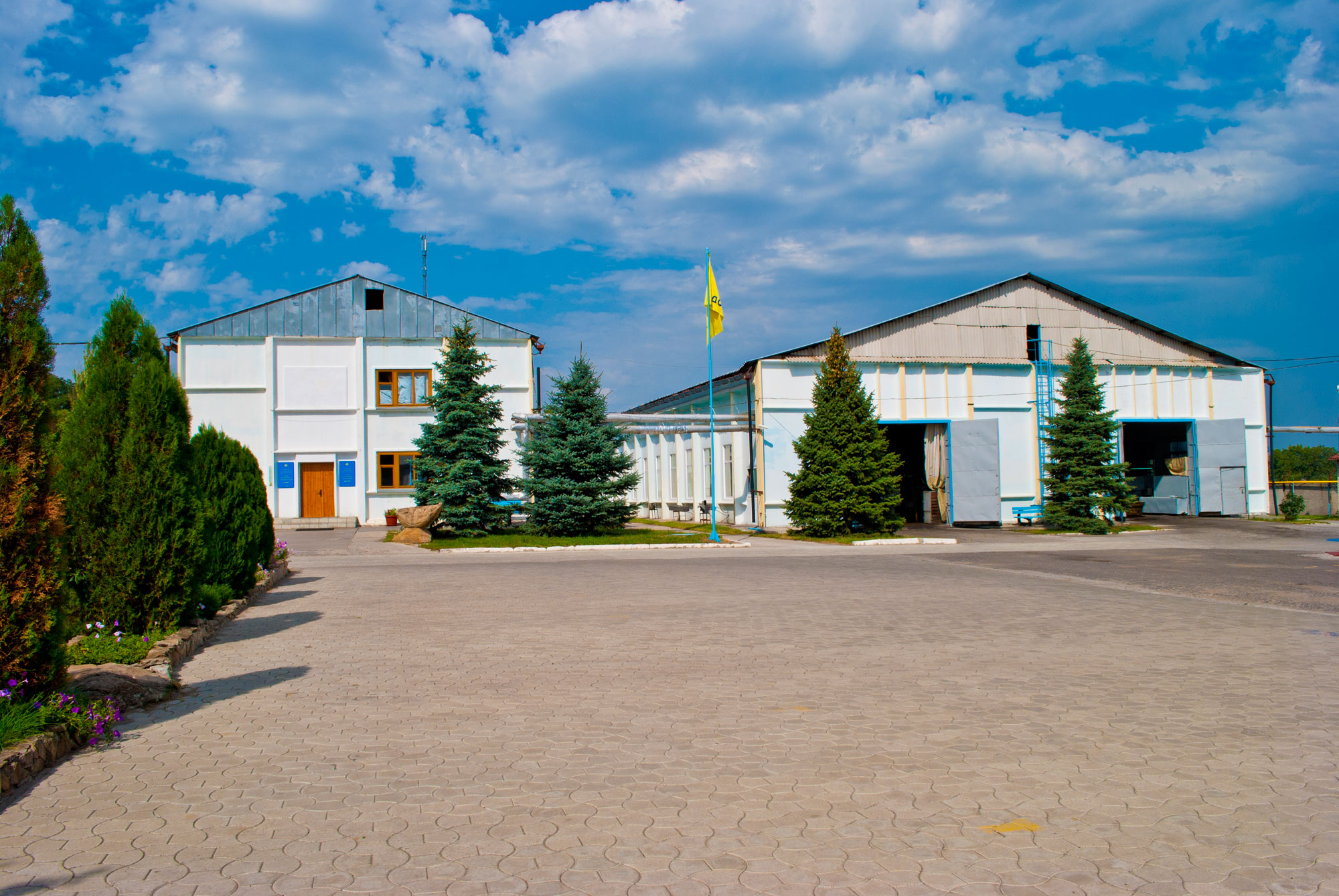 Завод автогенного оборудования "ДОНМЕТ" г. Краматорск